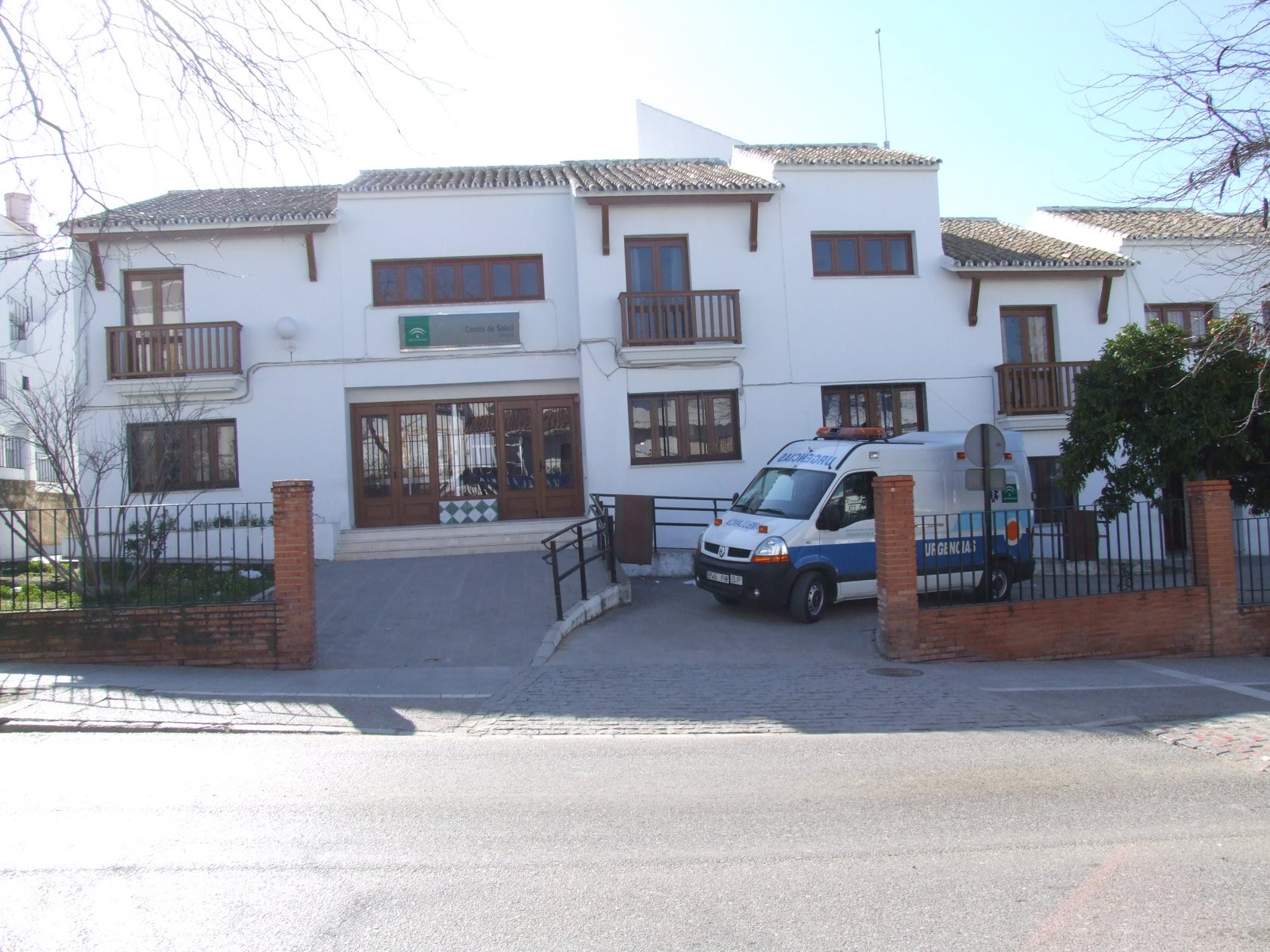 Centro de Salud de Olvera